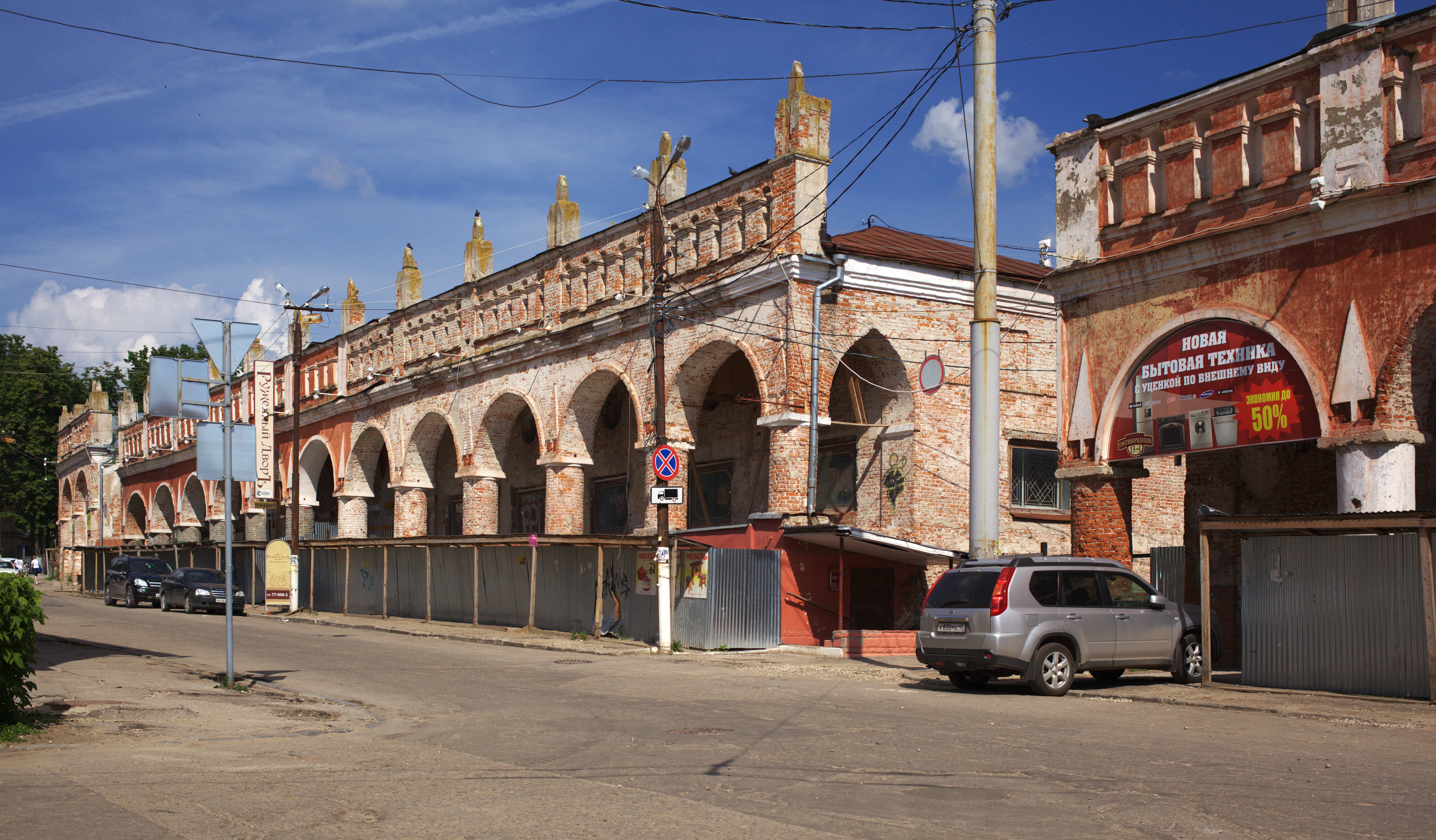 Гостиный двор, Калуга. Западные корпуса